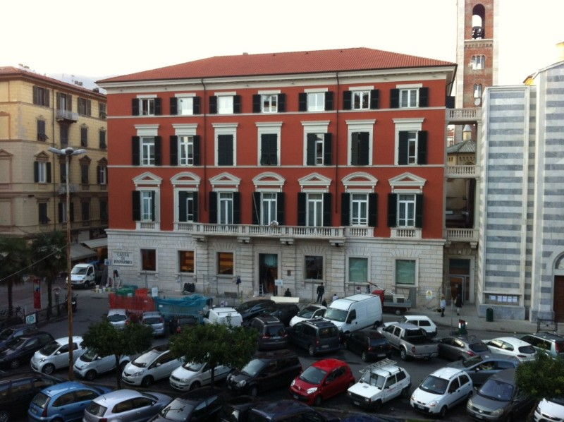 Palazzo Biassa in Piazza Beverini alla Spezia